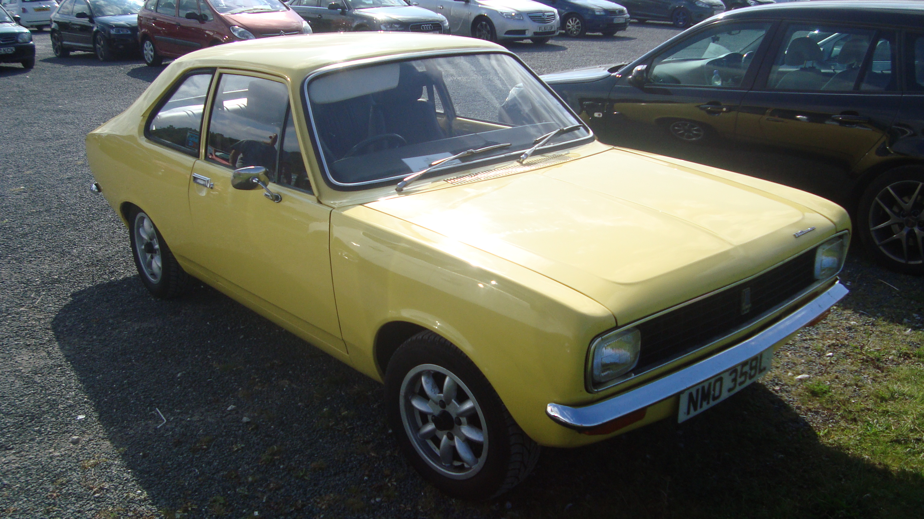 1973 Hillman Avenger 1500 Deluxe